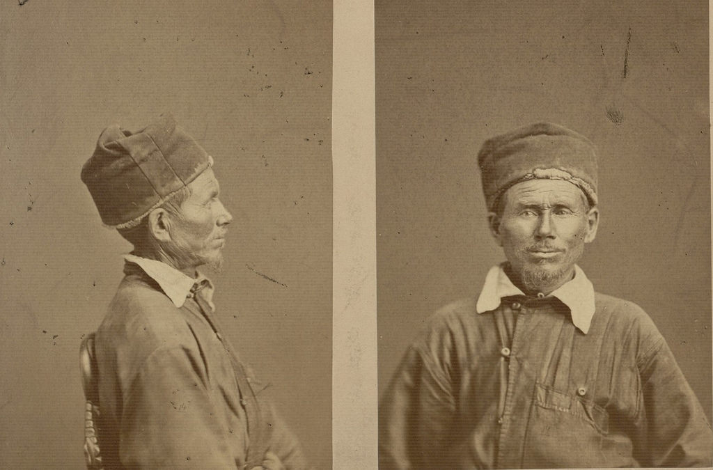 Оренбуржье. Башкир-. 1870-е. Автор К. Фишер.